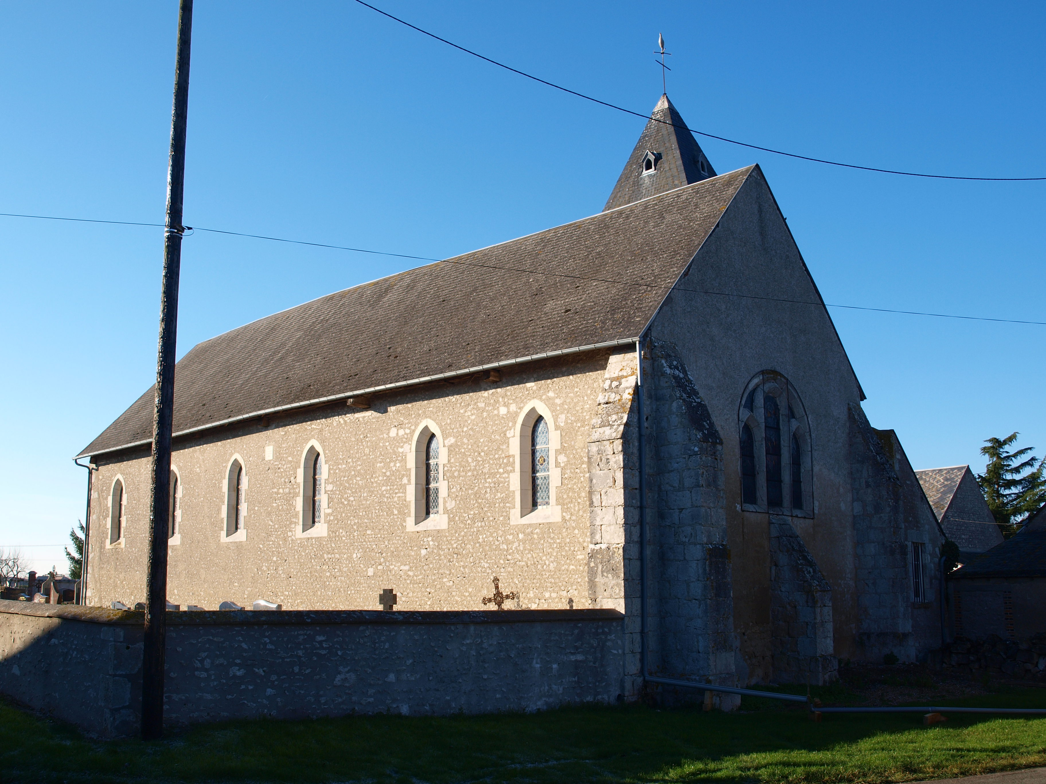 Rozières-en-Beauce (Loiret, France) ; église